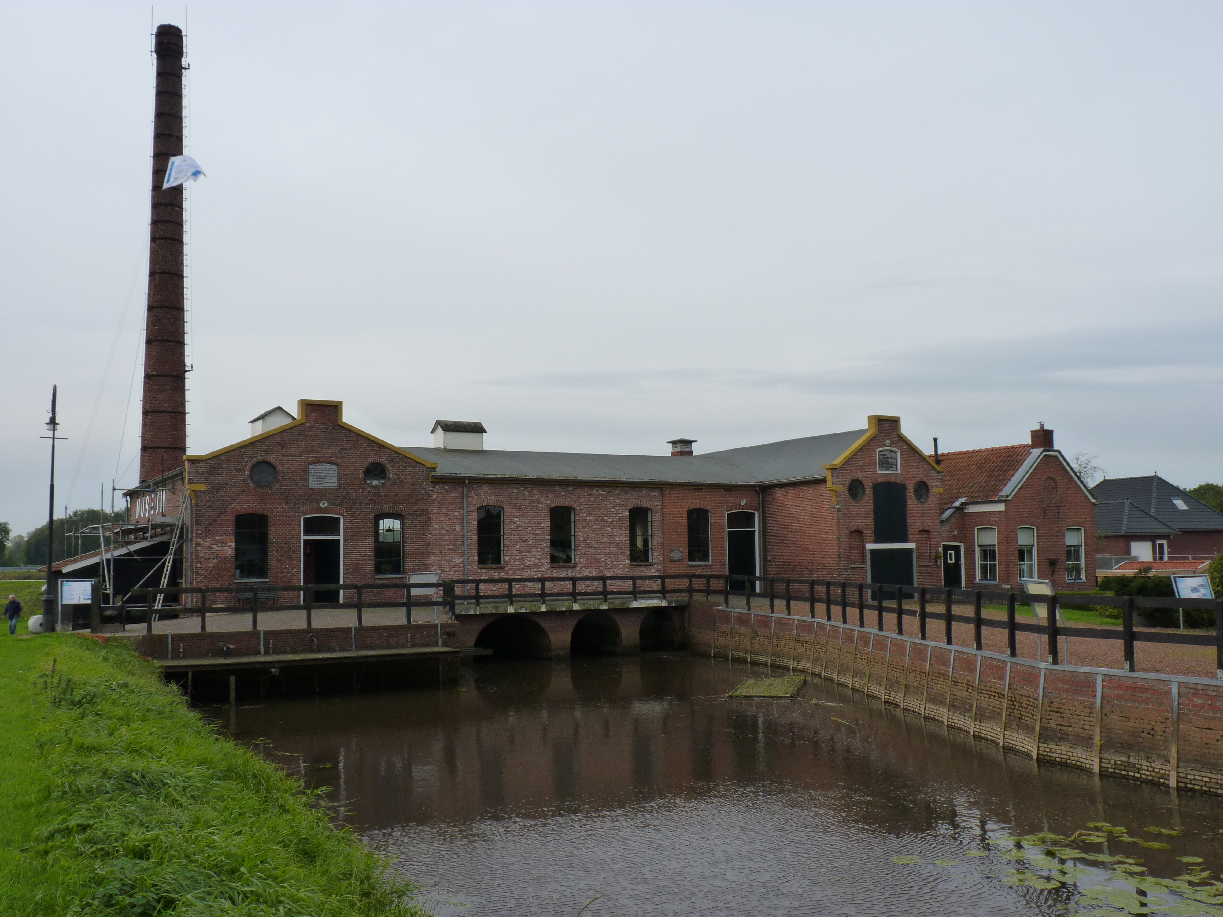 Winschoten Stoomgemaal 2010